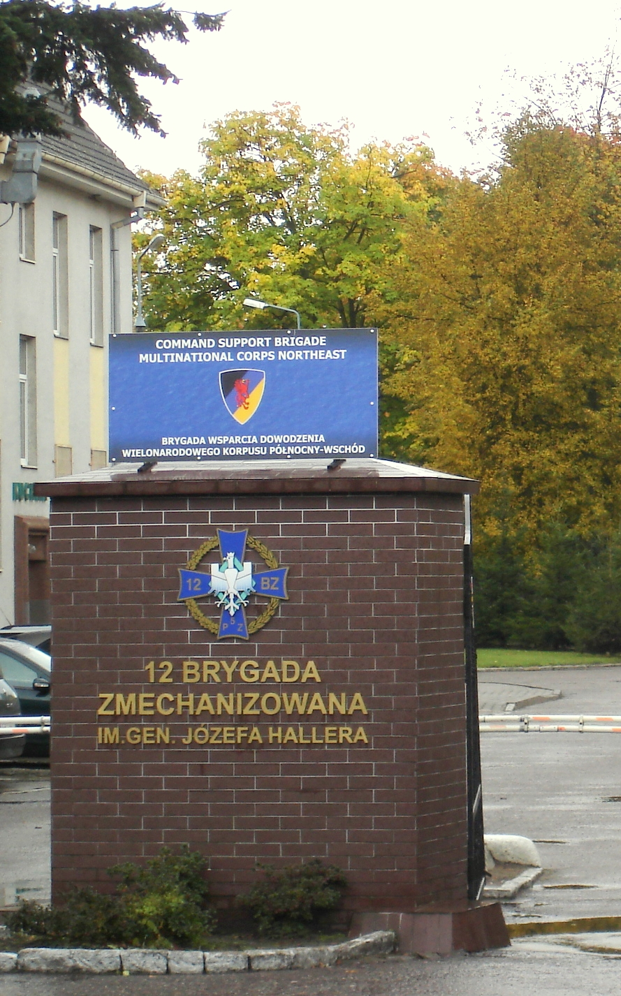 12 BZ w Stargardzie Szczecińskim